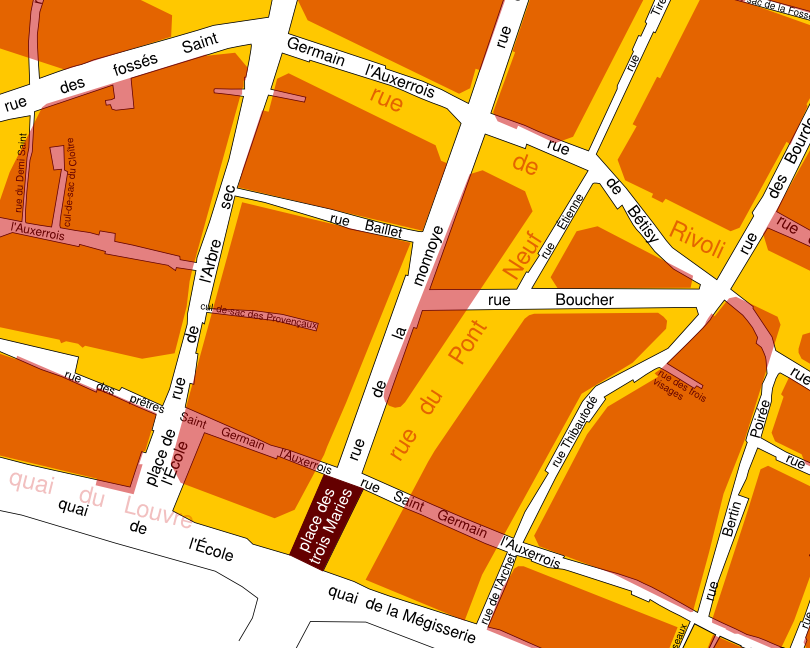 La place des Trois-Maries à Paris en 1793-1795 (plan des sections, feuille 34) avec, en superposition, le tracé contemporain (2014) des rues